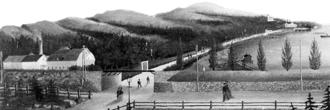 Fotografi av en teckning föreställande en vy av en del av norra Karlskrona. Teckningen är gjord före 1890 och fotot av teckningen har tagits före 1923.